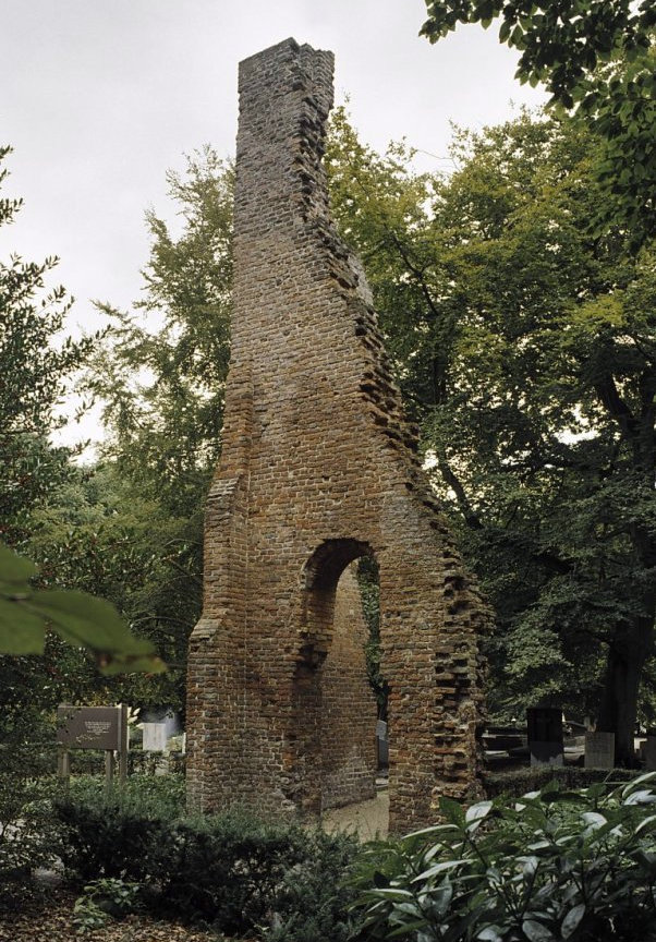 De ruïne van de Kerk van Eik en Duinen, welke tegenwoordig is gelegen in de gelijknamige begraafplaats.